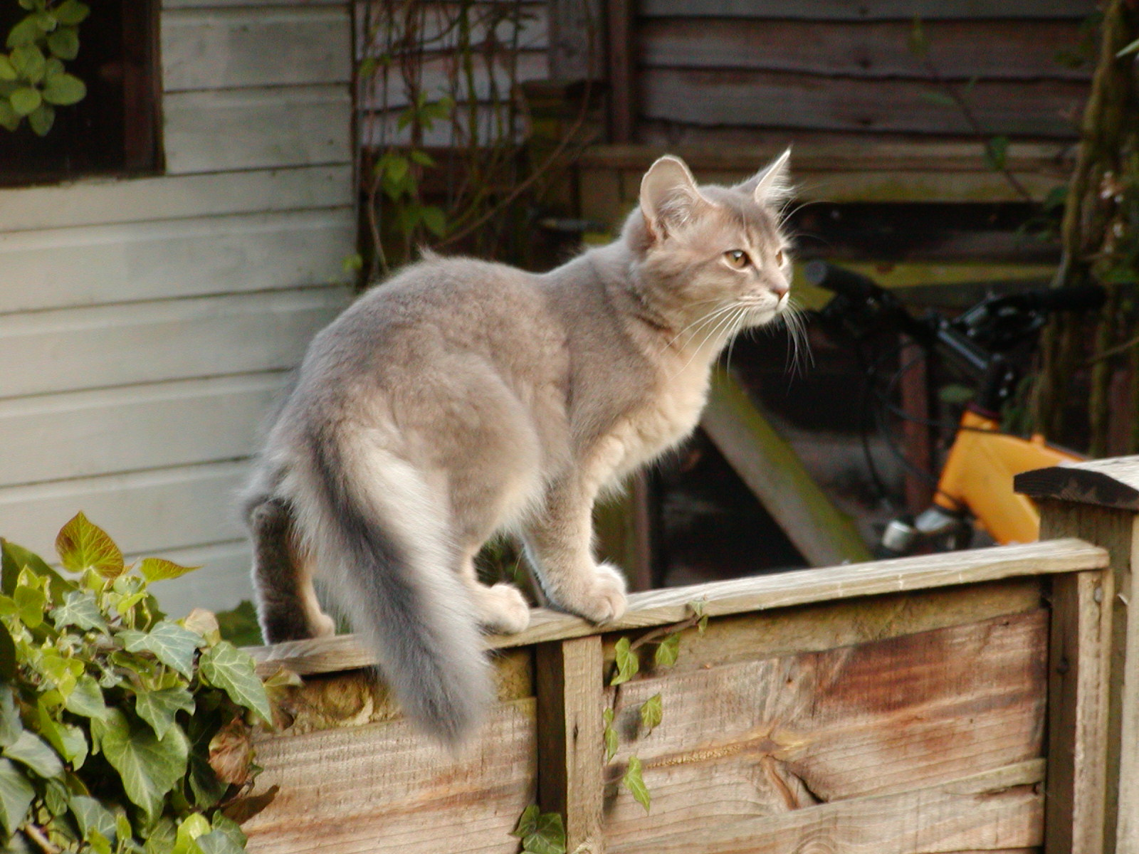 A blue Somali kitten, age 3 months.